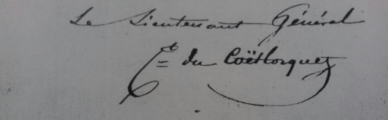 Signature de Charles Yves César Cyr du Coëtlosquet (1783-1836), général de division français.